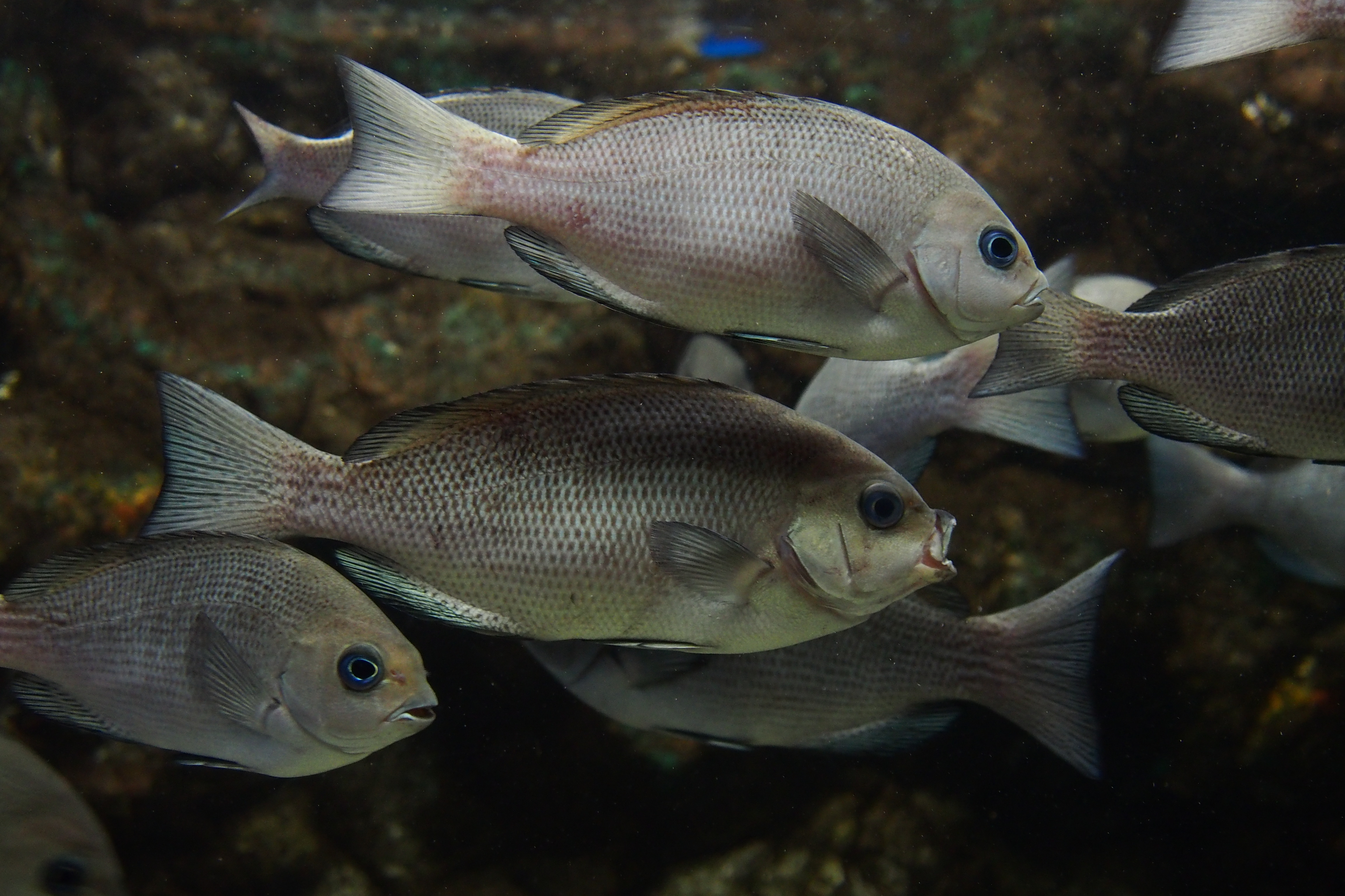 in Sunpiazza aquarium.